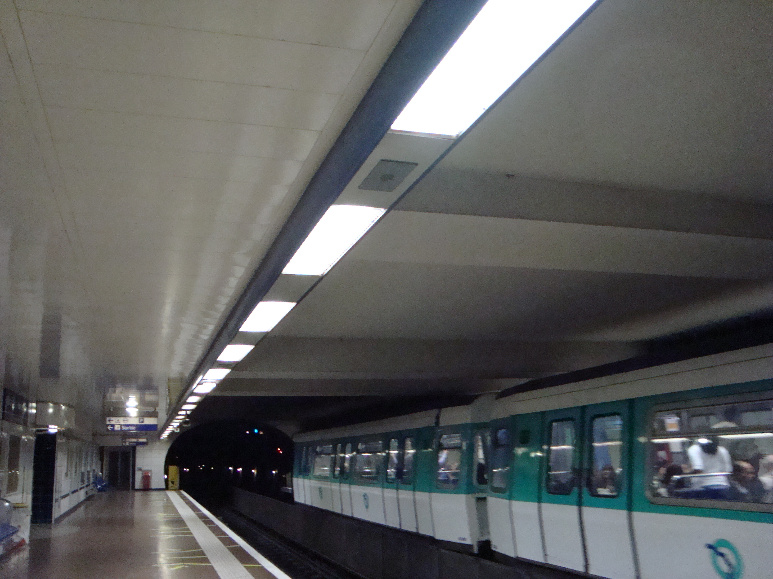 Rame à quai (allant vers Chatillon) à la station de métro Porte de Paris.